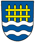 Znak obce Bochoř